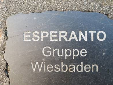 En 2005, Esperanto-Grupo Wiesbaden aĉetis pavimŝtonon ("Bürgerstein") kun sia nomo kadre de kampanjo "Ŝtono por eterno". Ĝi troviĝas sur la placo inter la urbodomo kaj´la landa parlamento, sub malnovstila lanterno. Per la mono akirita per tiaj ŝtonoj, la urbo financis la renovigon de la placo. Ĉio ĉi estas protektita kiel monumento.